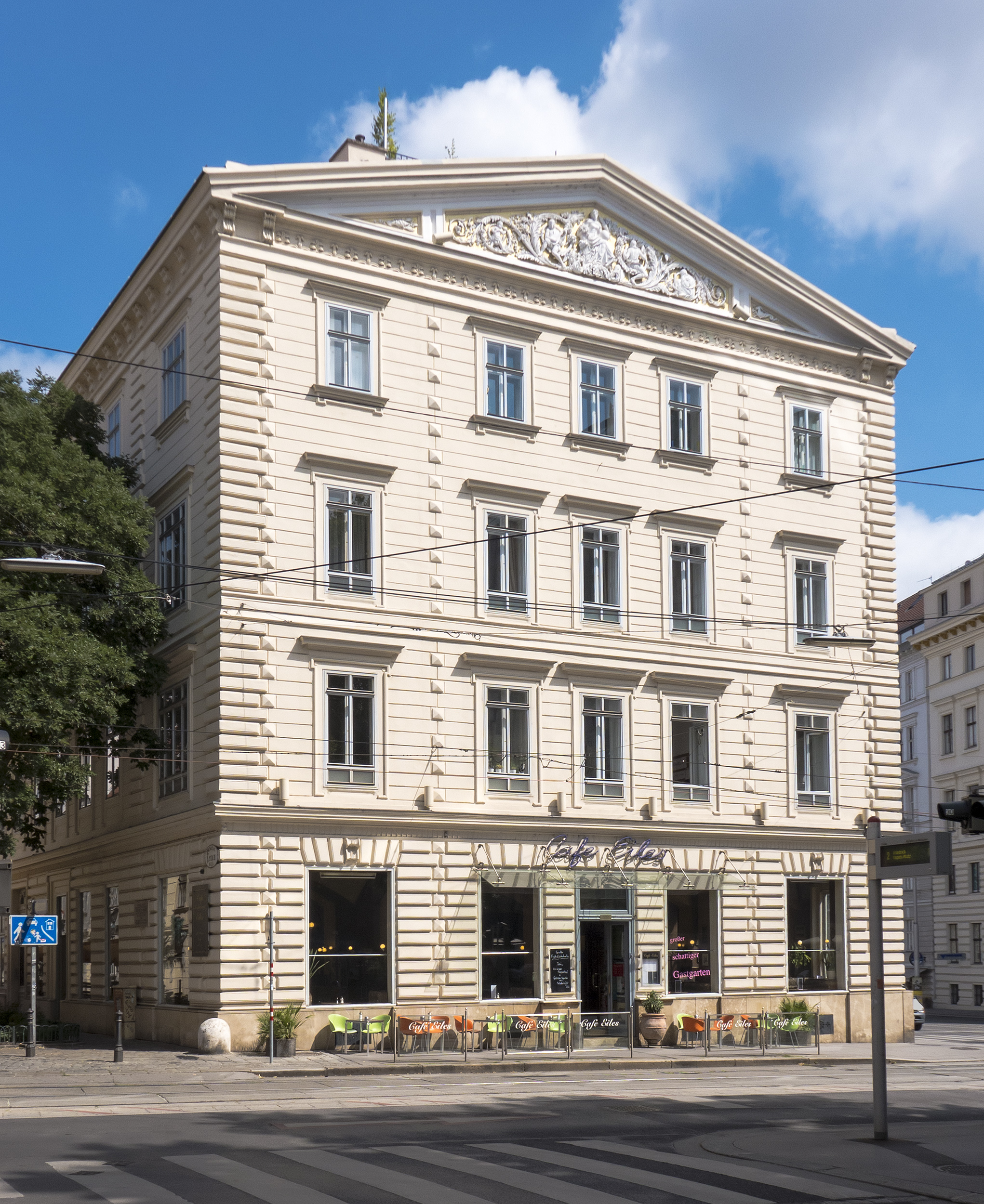 Café Eiles in Wien 8